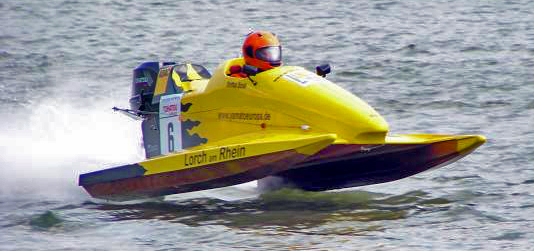 Ein Speedboot in Katamaranform.